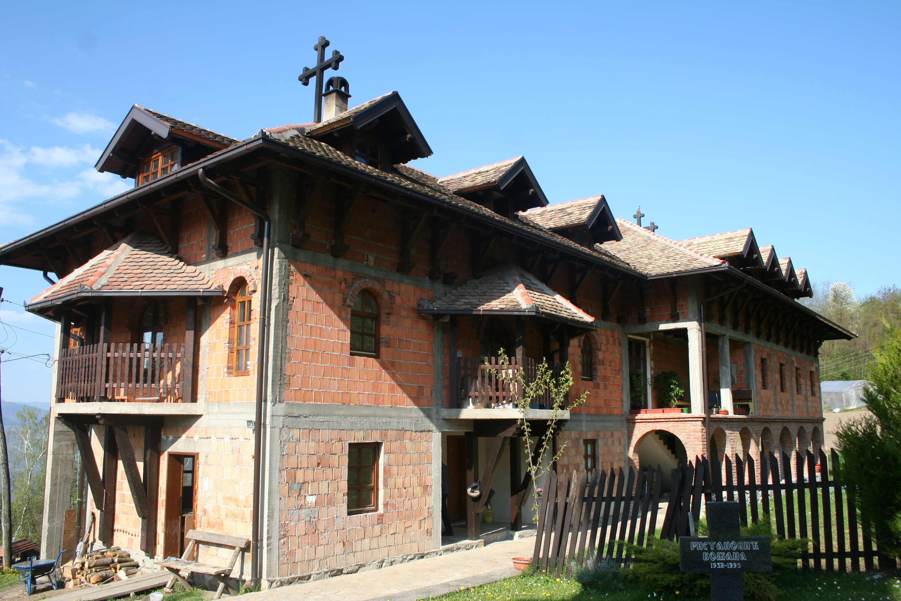 Manastir Bjele vode